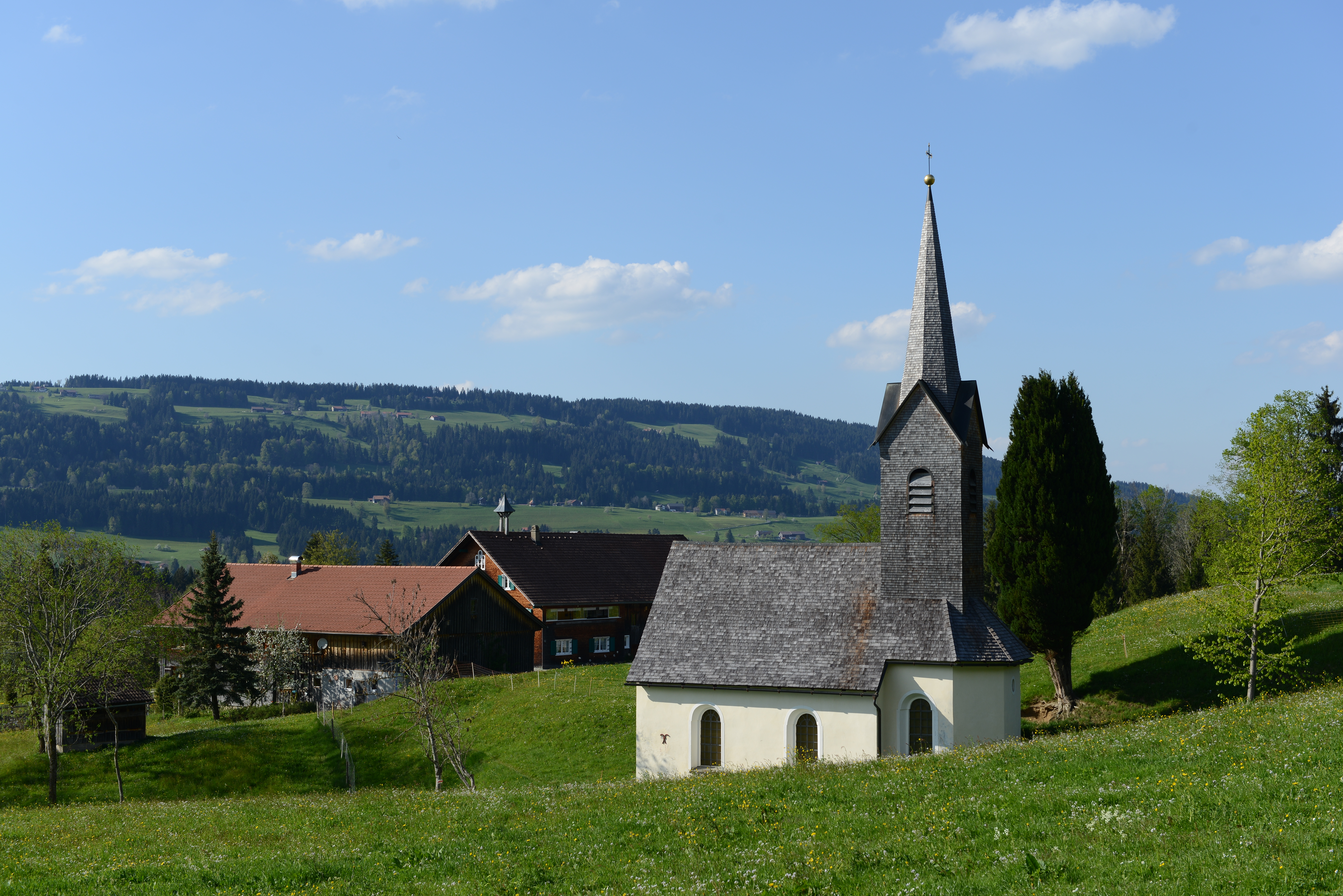 Kapelle hl. Anna in Riefensberg, Vorarlberg. Im 18. Jahrhundert errichtet; gemauerter Rechteckbau, schindelgedecktes Satteldach sowie langgestreckter Turm mit Giebelspitzhelm; im Inneren ein kreuzgratgewölbter Betraum mit Chor.